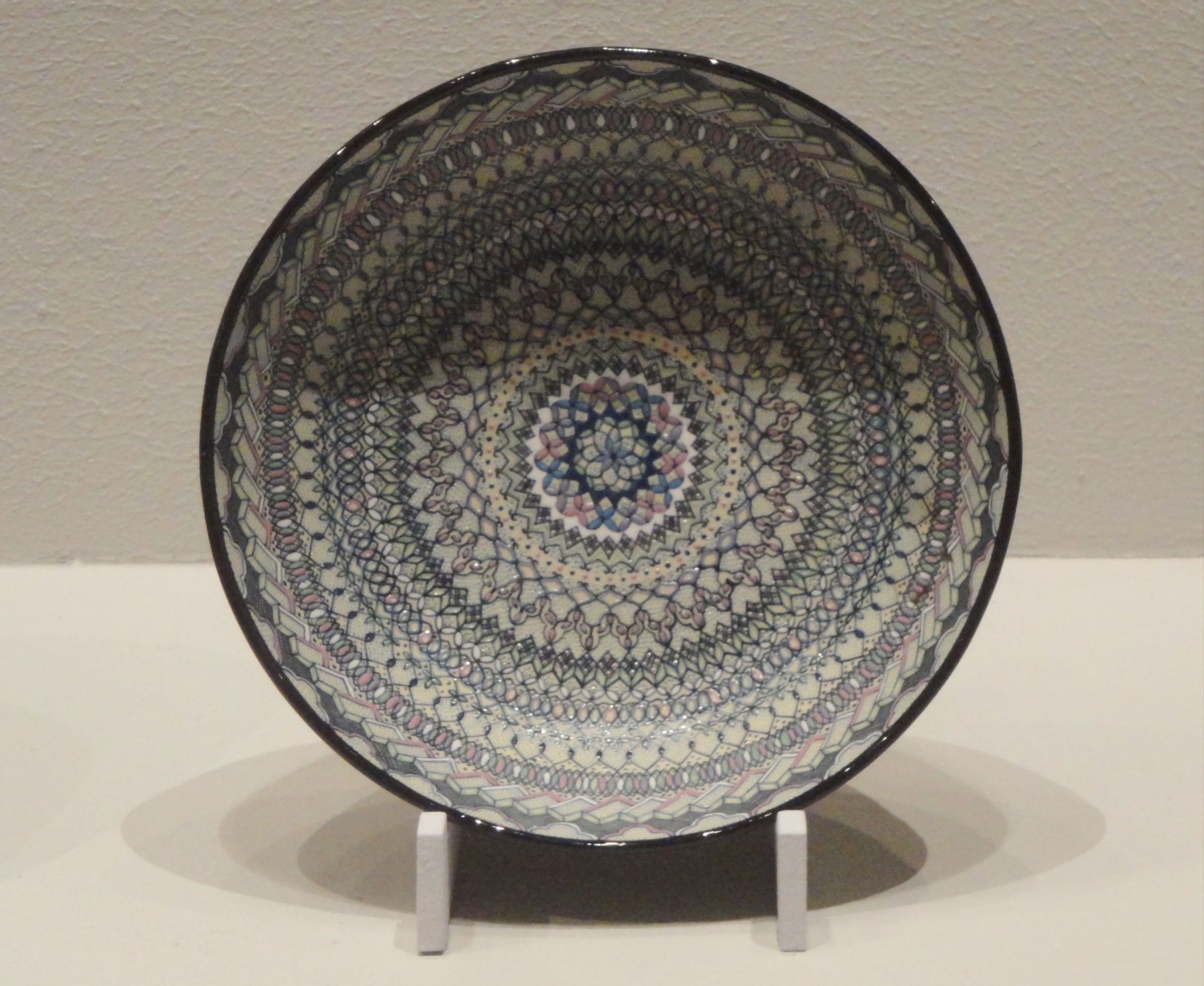 Frutero de barro de Tarandacuao, Guanajuato, México. Barro torneado, con esmalte estannífero y policromado (mayólica).